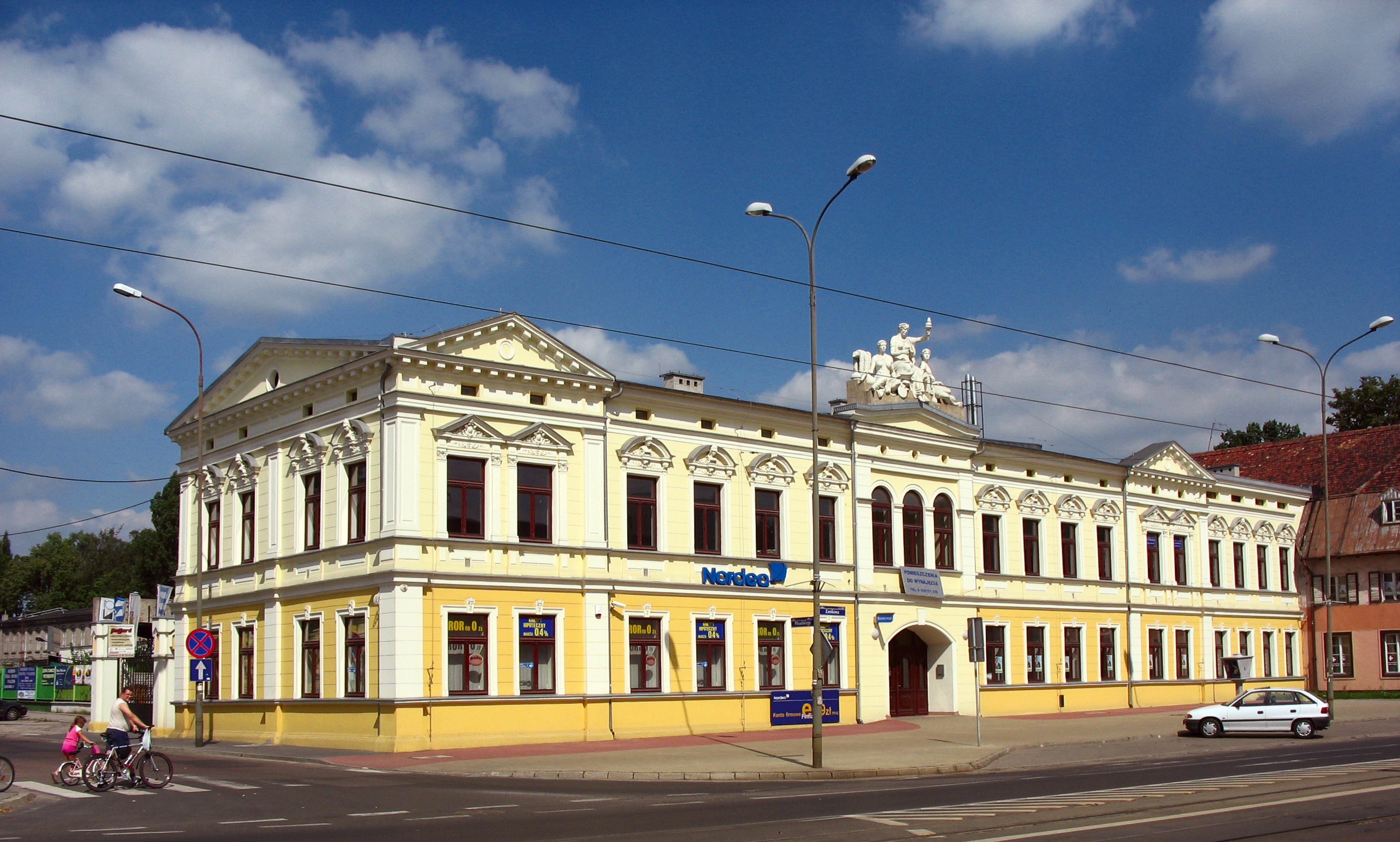 Pabianice - dawne biuro zakładów "Krusche-Ender" (zabytek nr rejestr. A/269)